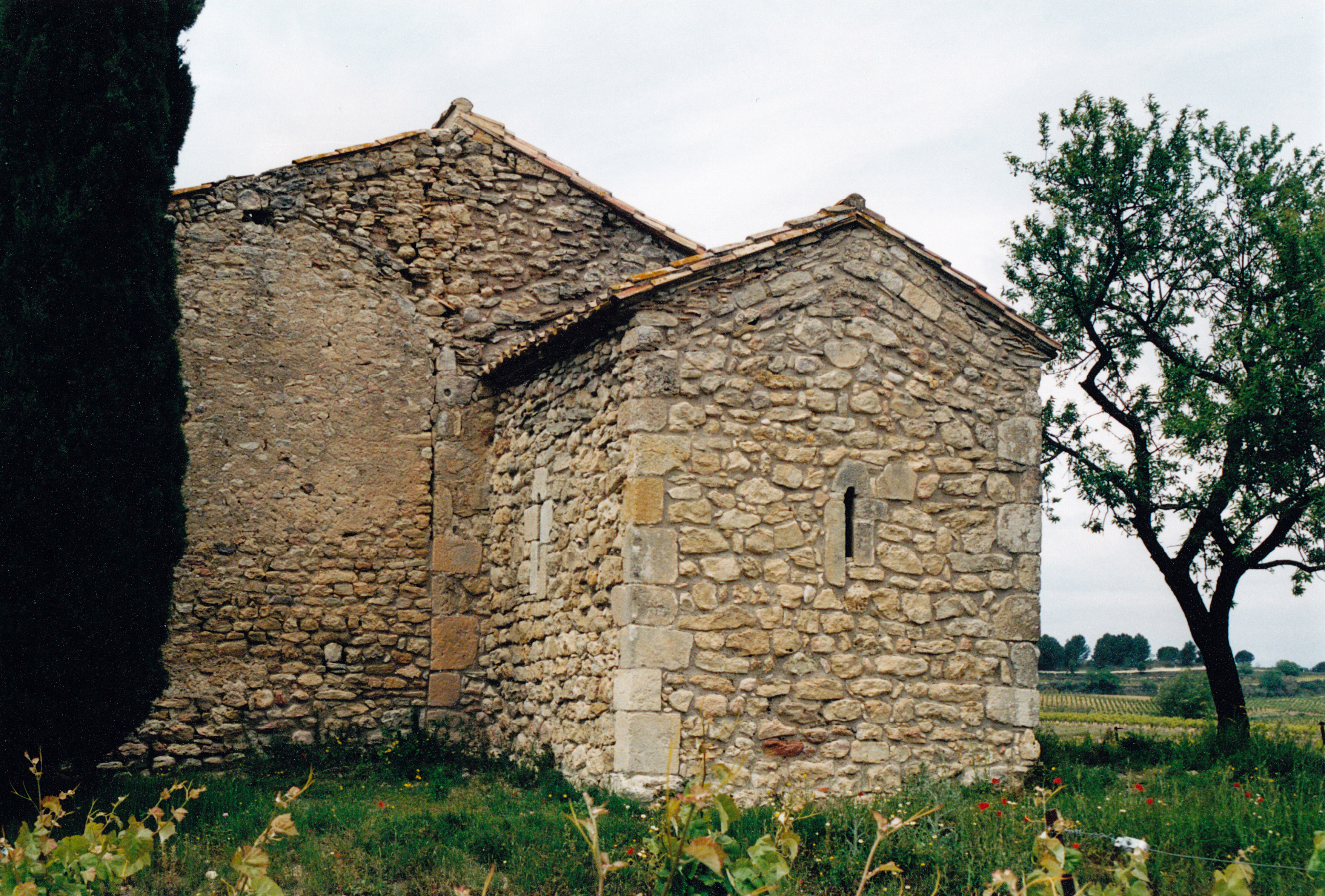 France - Languedoc - chapelle Saint-Laurent de Moussan (préroman)